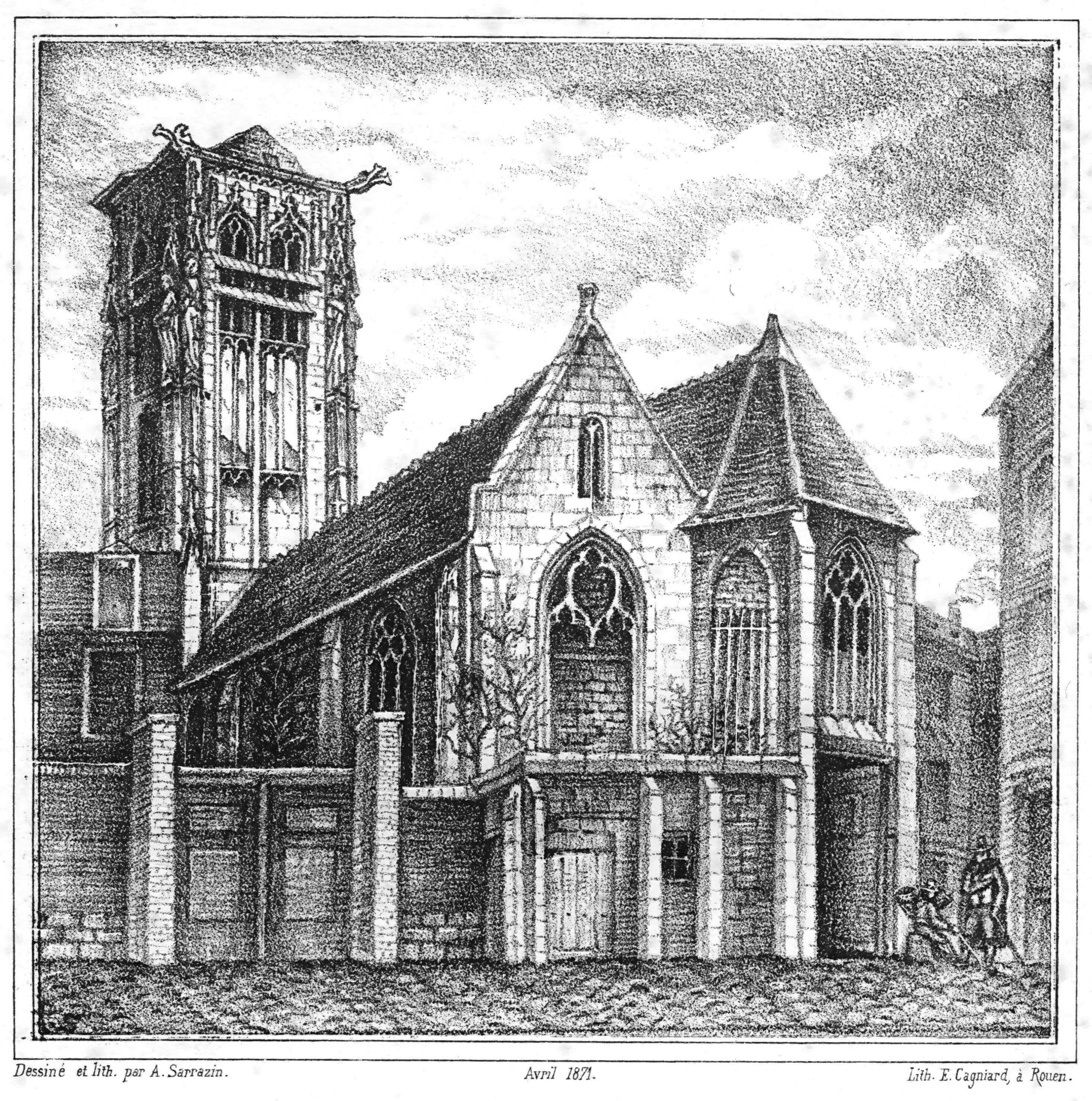 Représentation de l'église Saint-Pierre-du-Châtel de Rouen dans son état initial